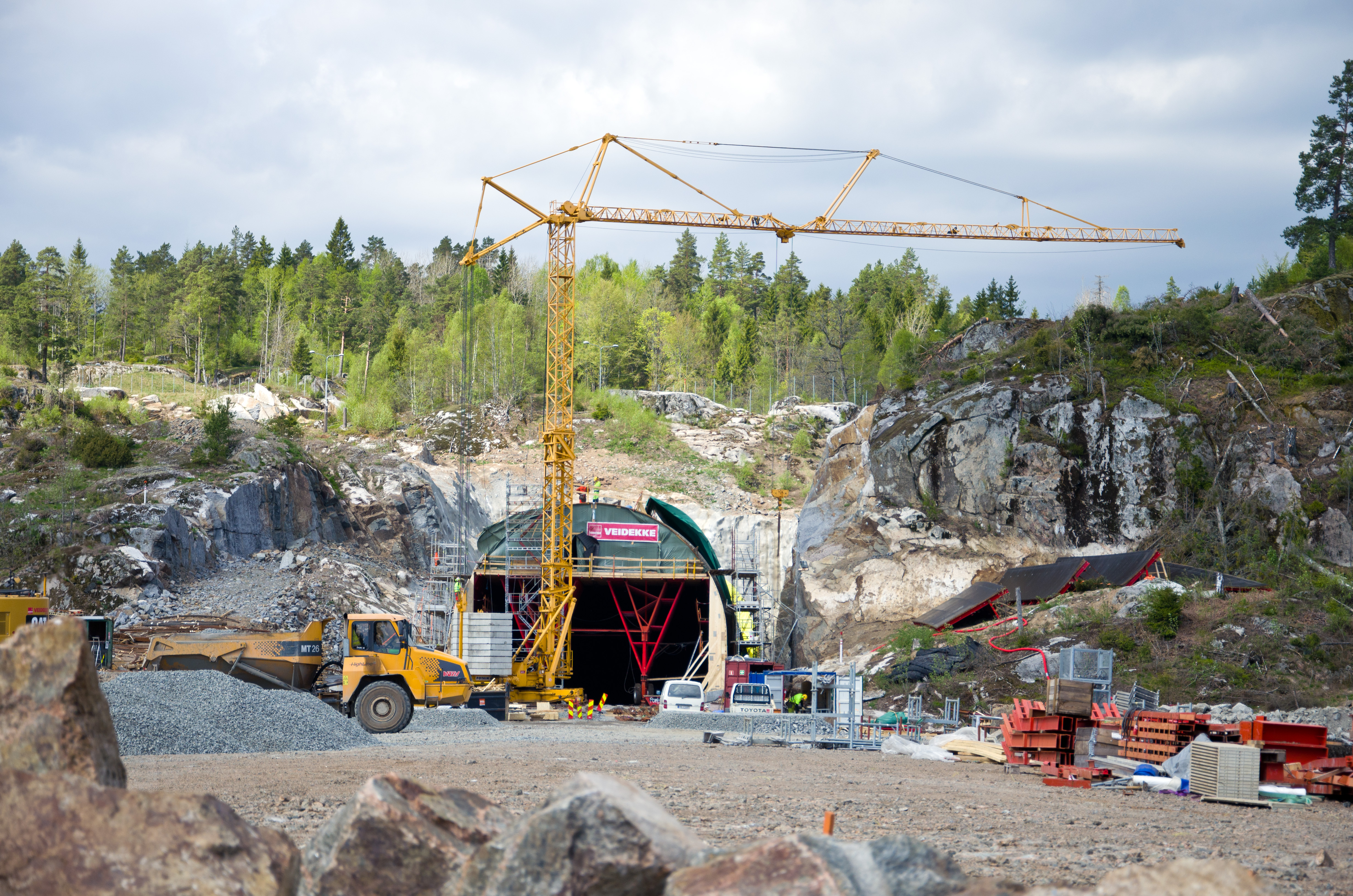 Skillingsmyr tunnel, sørøstre innslag, april 2014. Porsgrunn, Telemark, Norge